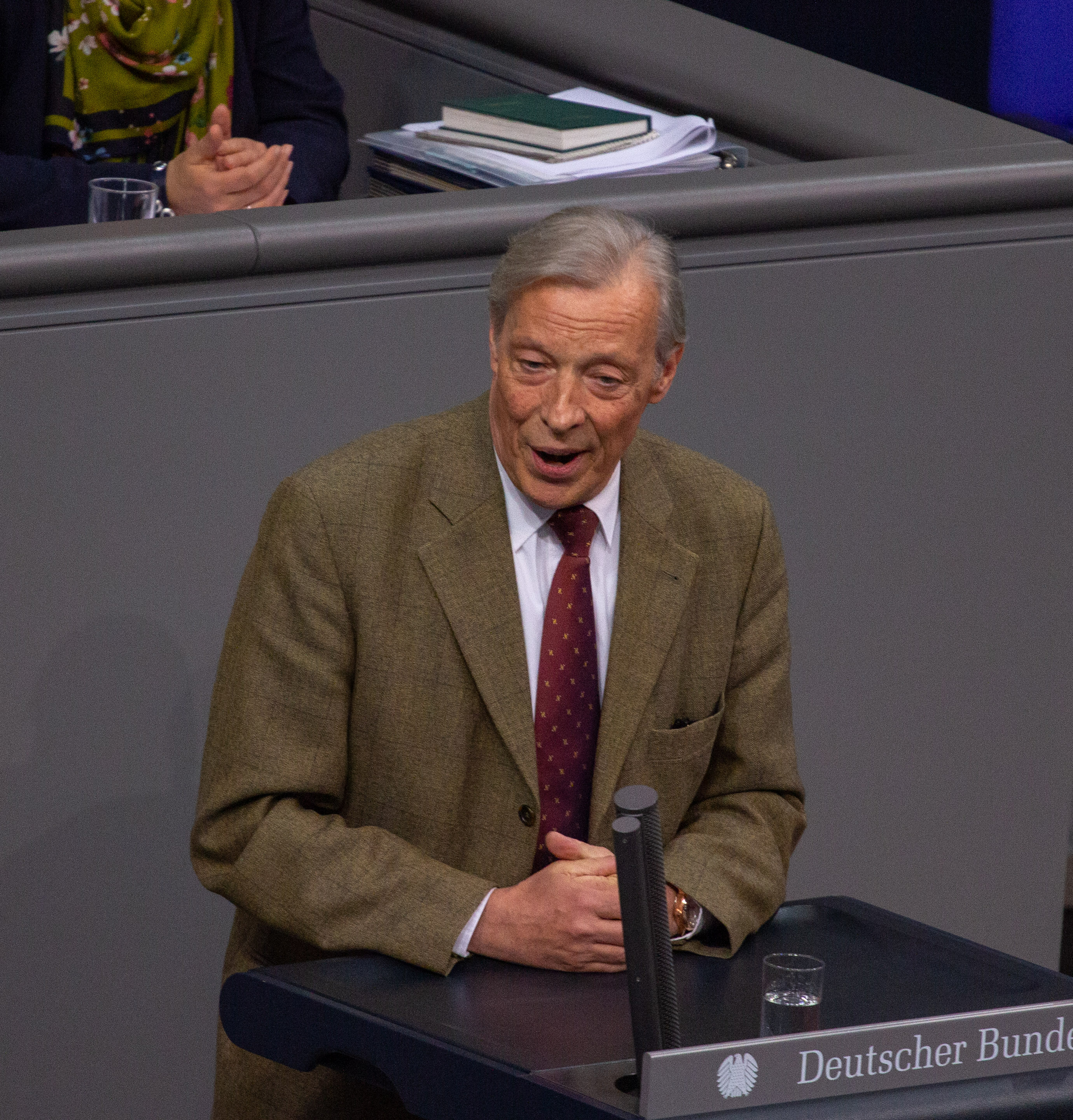 Armin-Paul Hampel, Mitglied des Deutschen Bundestages, während einer Plenarsitzung am 11. April 2019 in Berlin.